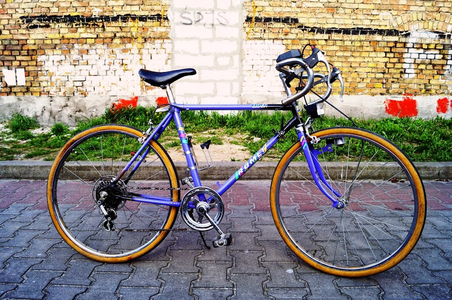 romet lider sport bike polish construction